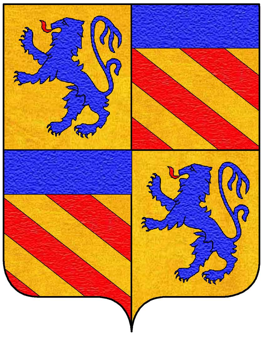 Stemma della famiglia Caracciolo Pasquizi